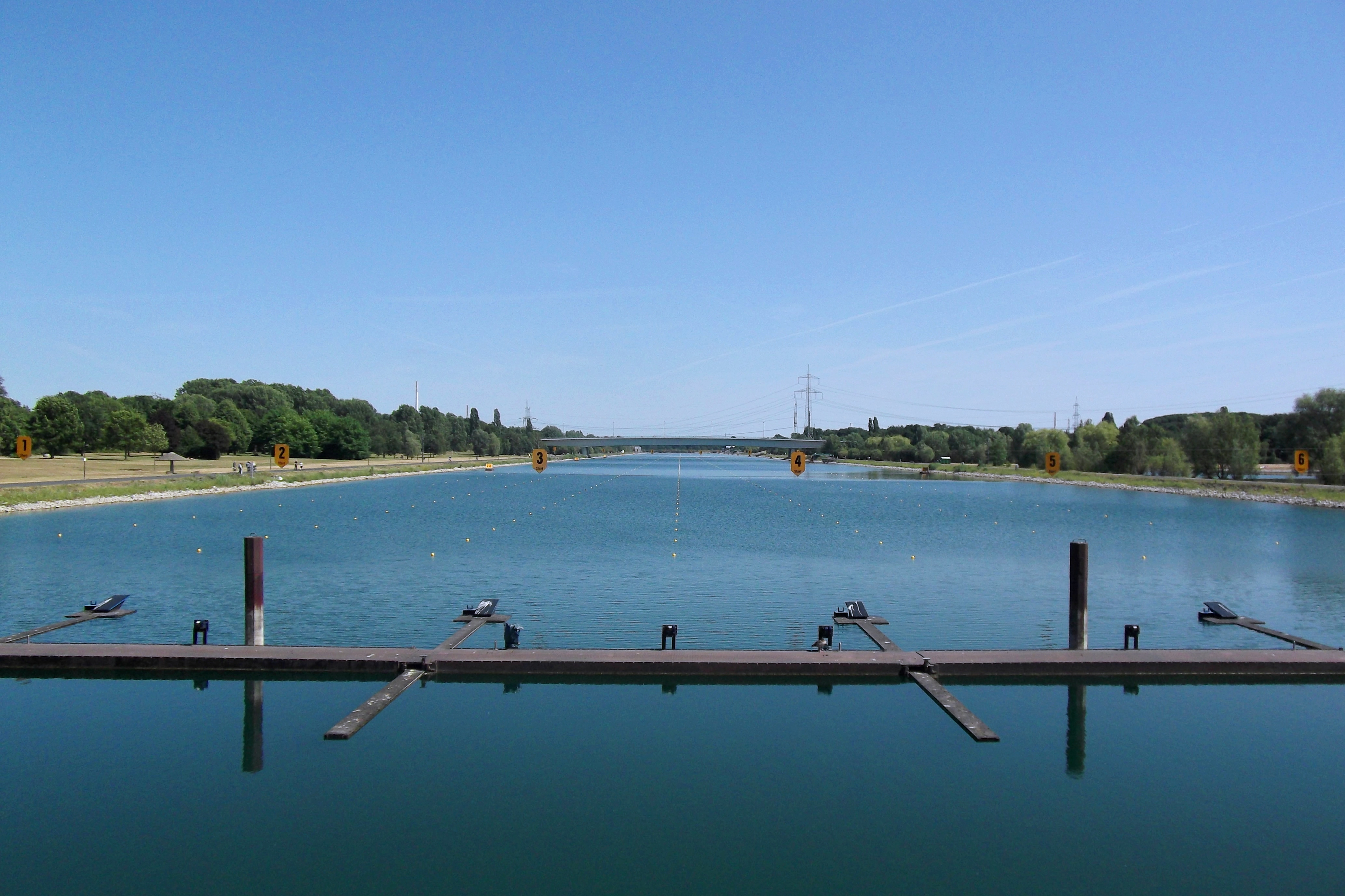 Cologne (Köln), Germany: Fühlinger See